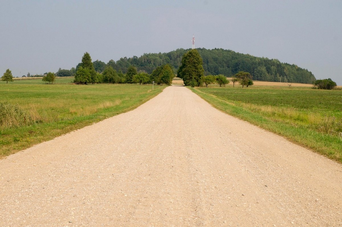 Варганская гара